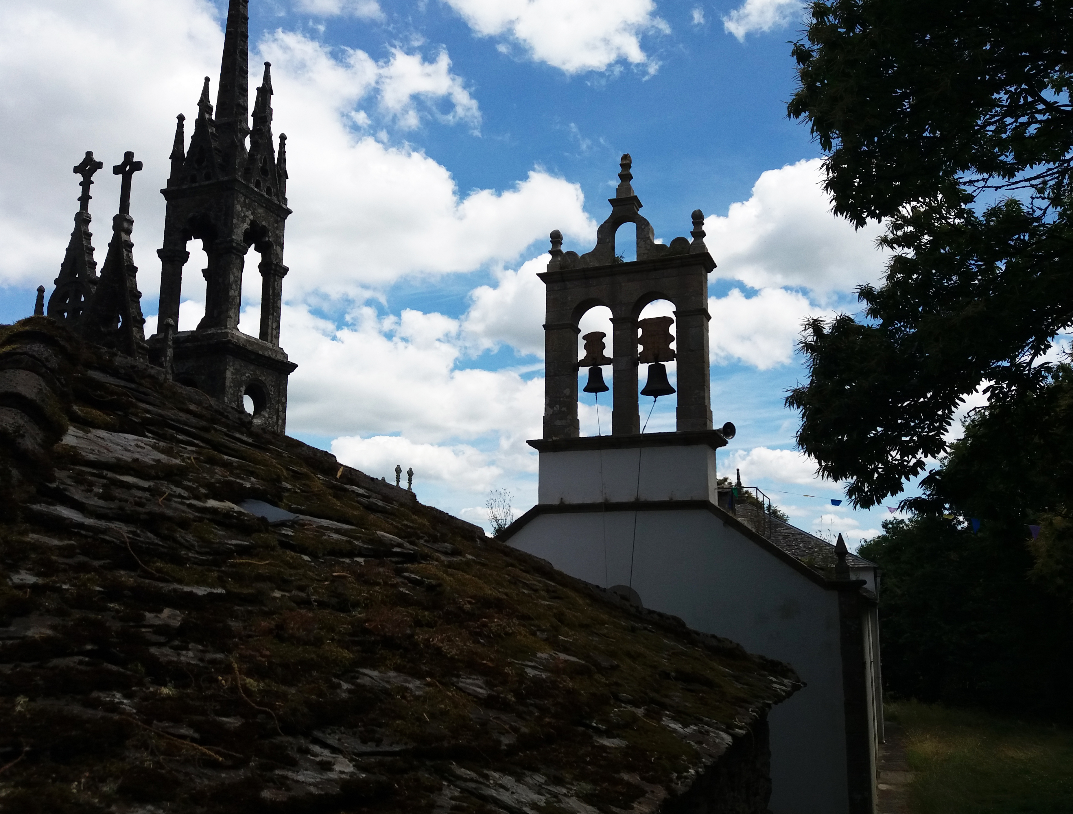 Igrexa e cemiterio na parroquia de Vilapene, no concello de Cospeito